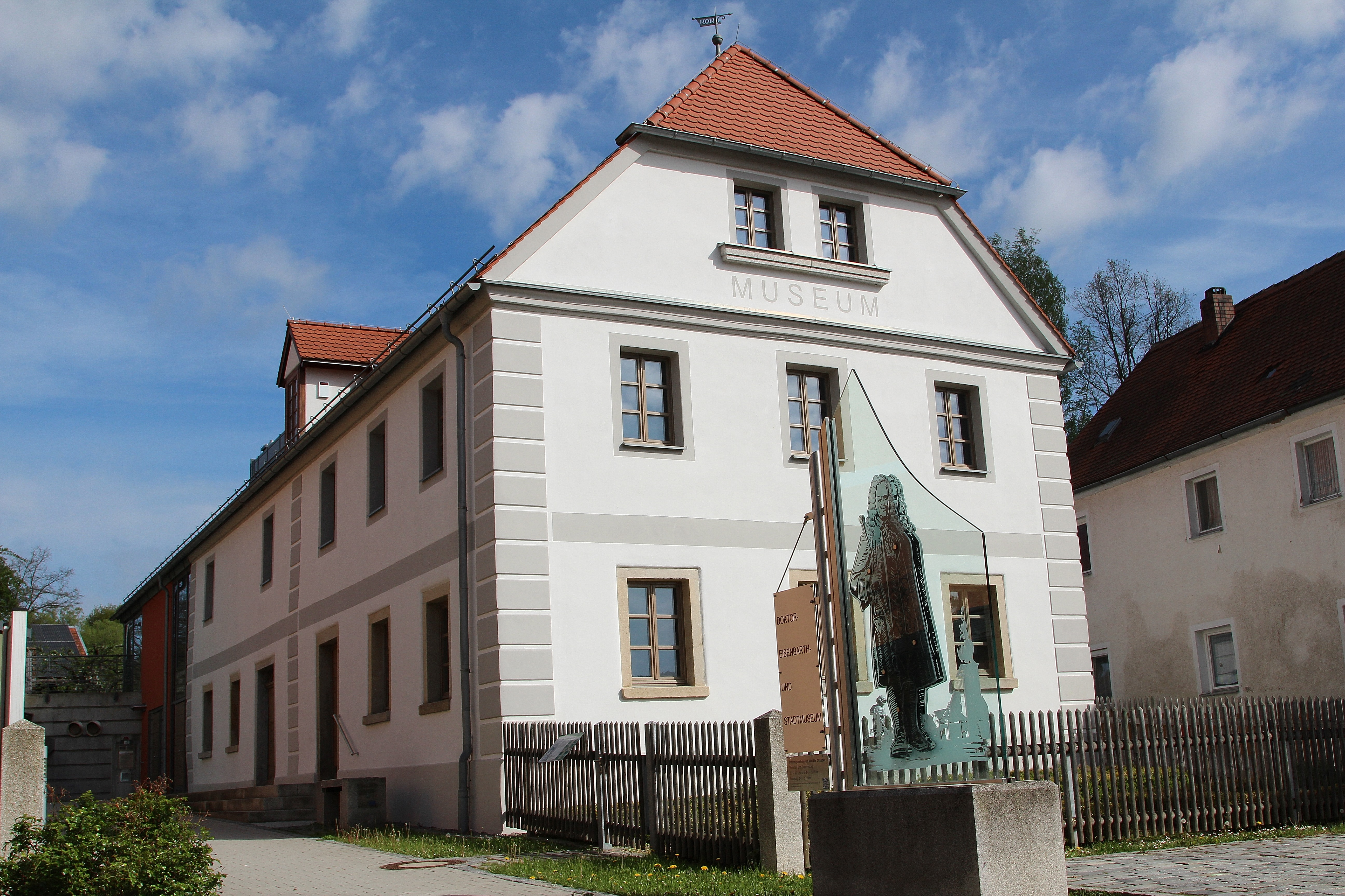 Eisenbarth- und Stadtmuseum Oberviechtach